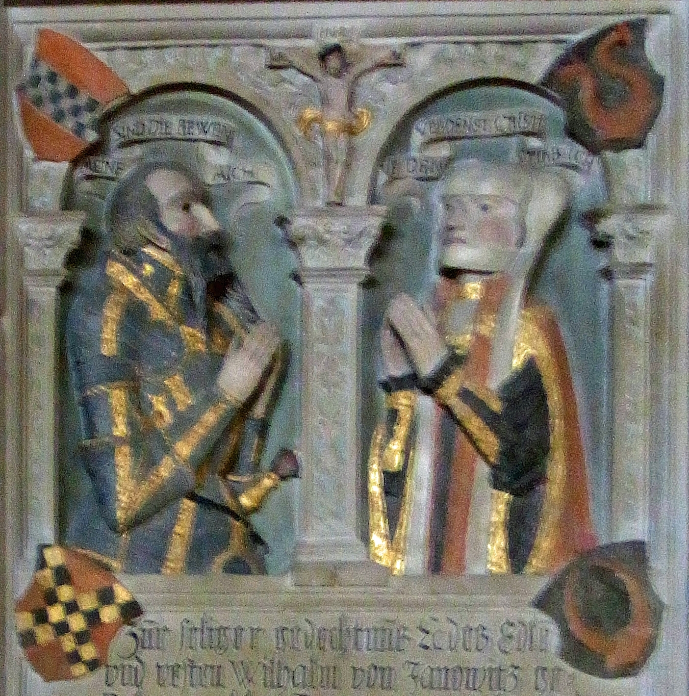 Epitaph von Wilhelm von Janowitz und Anna von Sachsenheim, 1553, Tübingen, Stiftskirche. – Rechts: Büffelhornwappen mit nach außen bzw. nach innen gebogenen Hörnern.